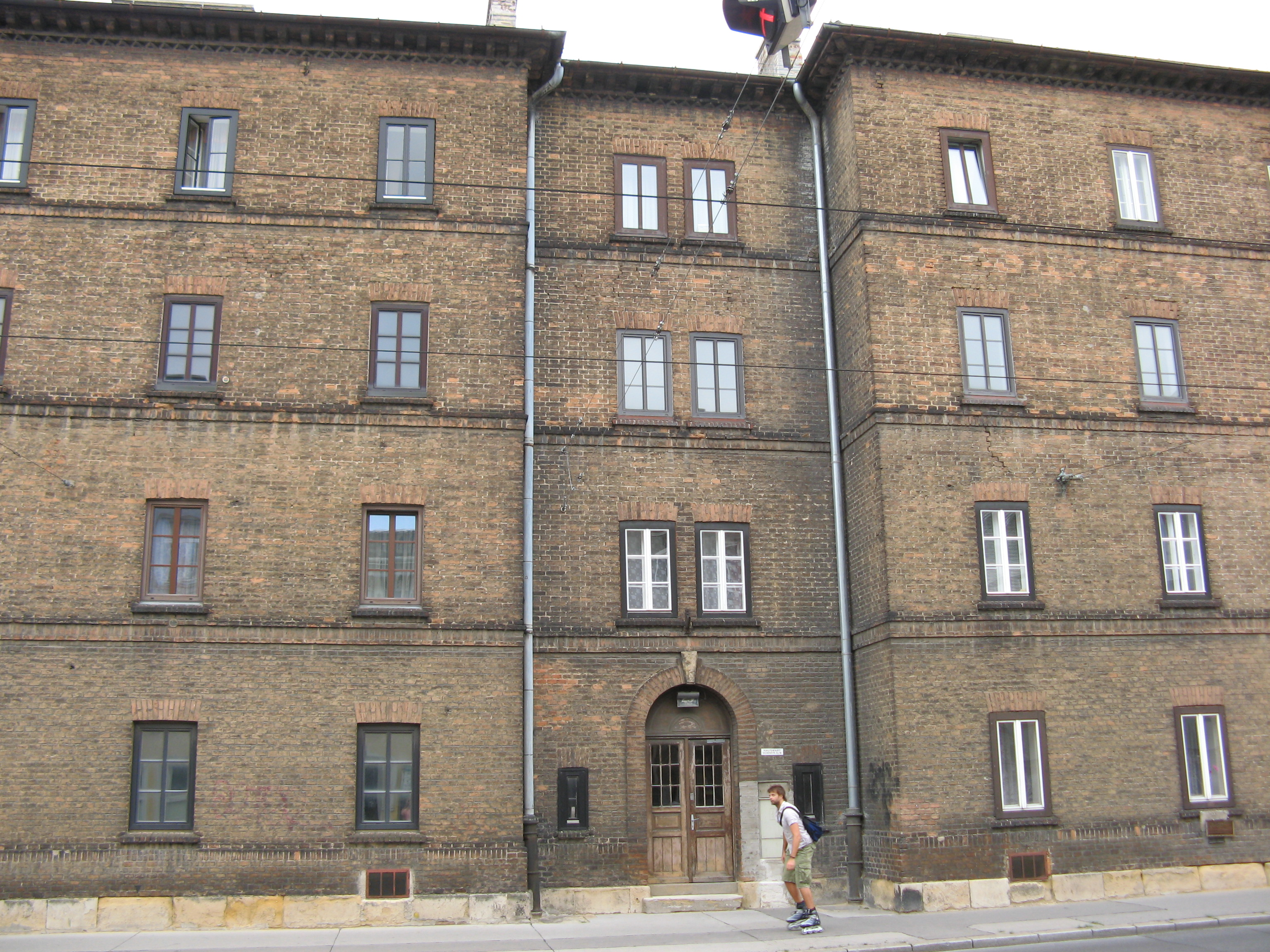 Arbeiterwohnhäuser an der Eichenstraße (um 1870)